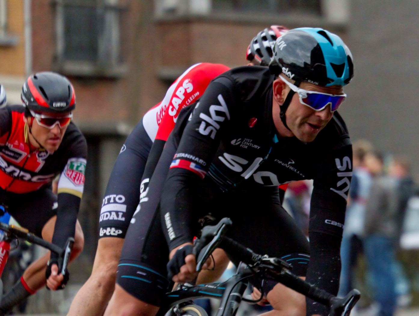 072 stannard van avermaet